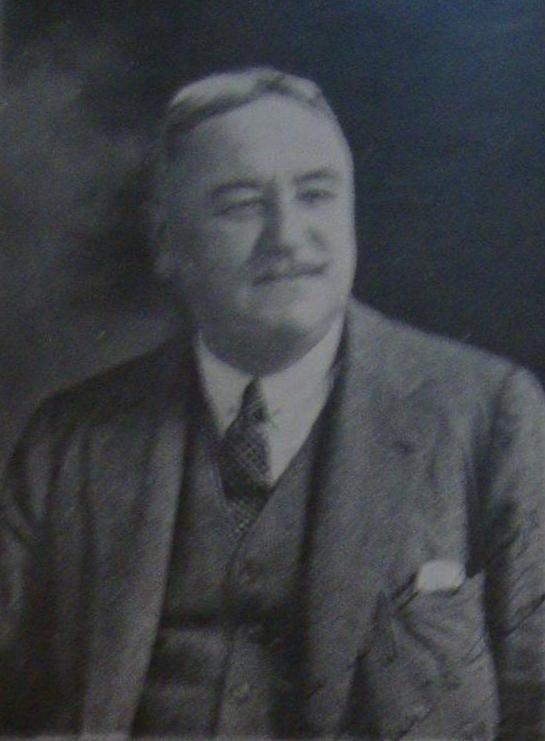 Retrato del arquitecto inglés Paul B. Chambers, que realizó la mayoría de sus obras en la ciudad de Buenos Aires, Argentina.